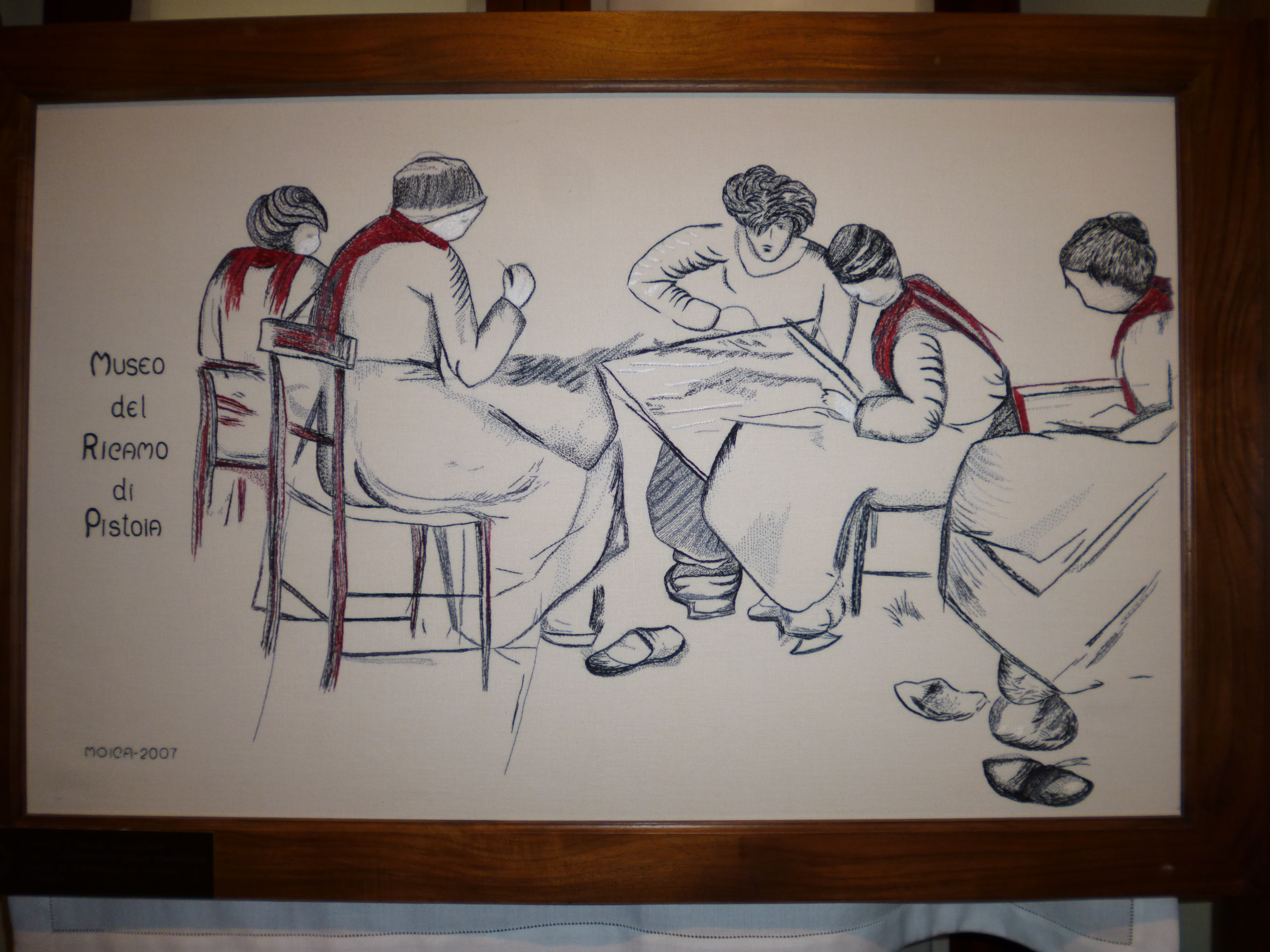 Immagine ricamata a "punto Pistoia"